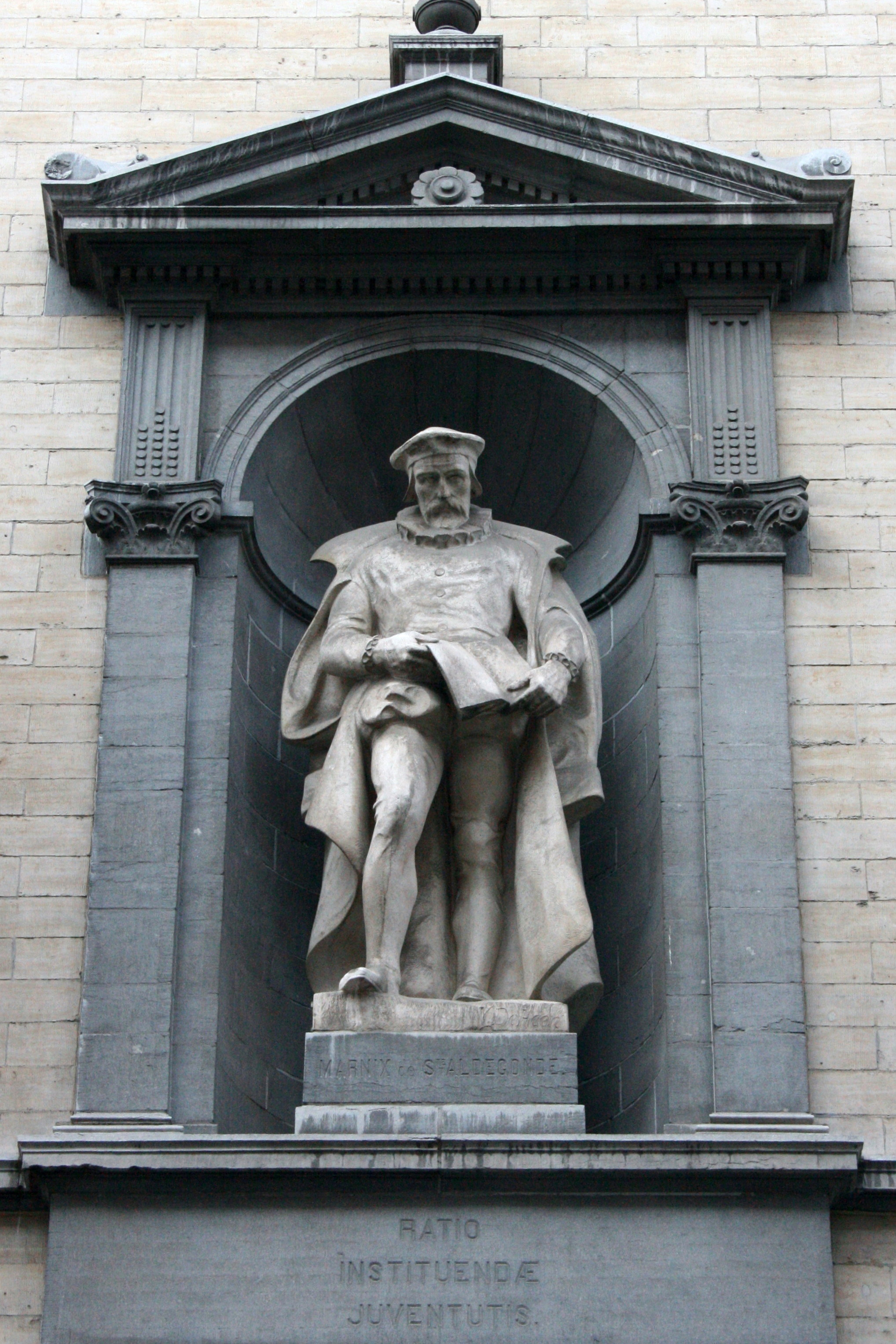 Rue Haute 255, Bruxelles, Belgique. Ecole communale n° 7. Statue de Marnix de Sainte-Aldegonde. Inscription RATIO INSTITUENDAE IUVENTUTIS